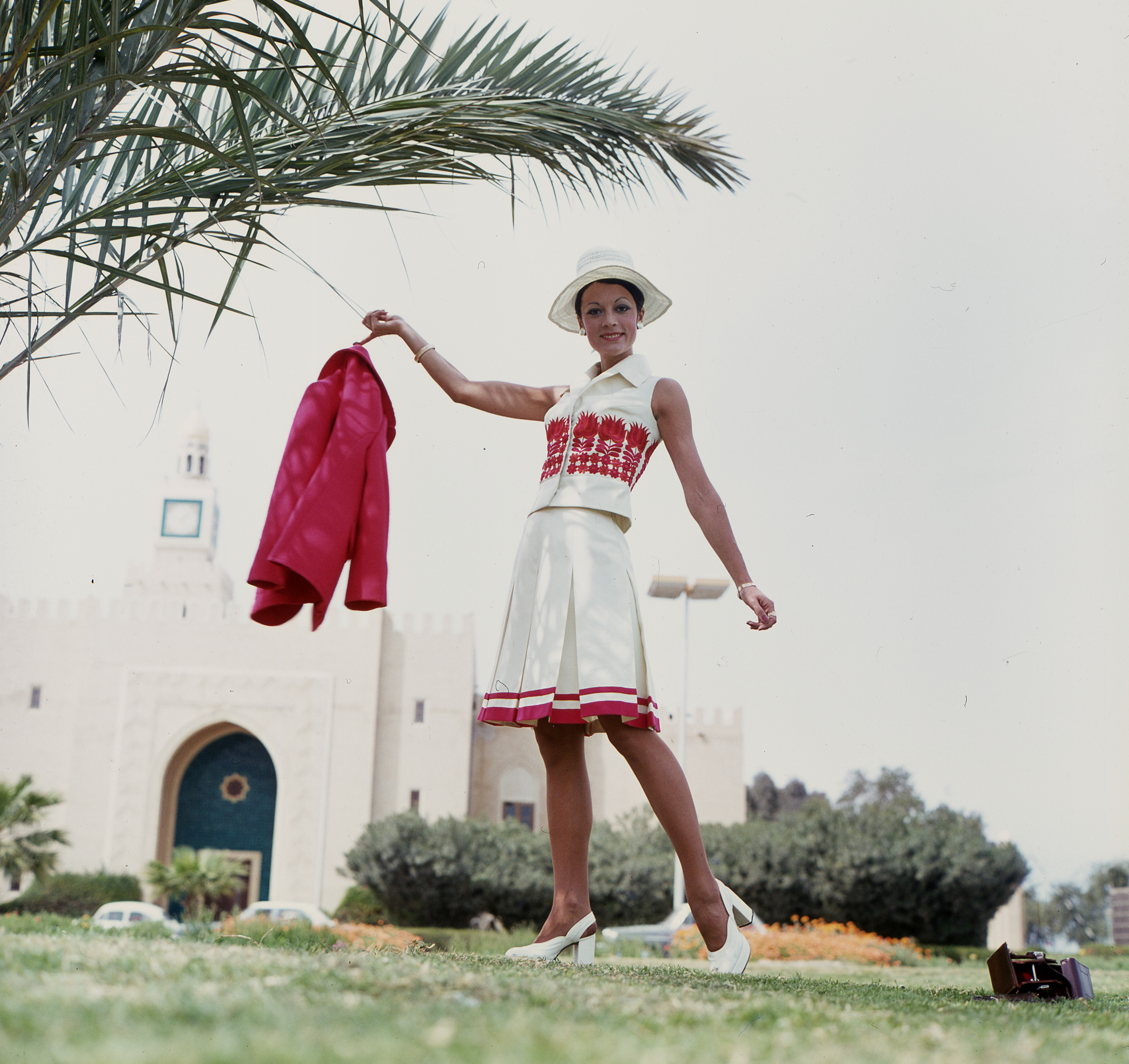 Seif tér, a kuvaiti emír palotája (Seif palace). Csató Mari manöken. Location: Kuwait Tags: colorful, fashion, lady, costume, jacket, platform shoes Title: Seif tér, a kuvaiti emír palotája (Seif palace). Csató Mari manöken.